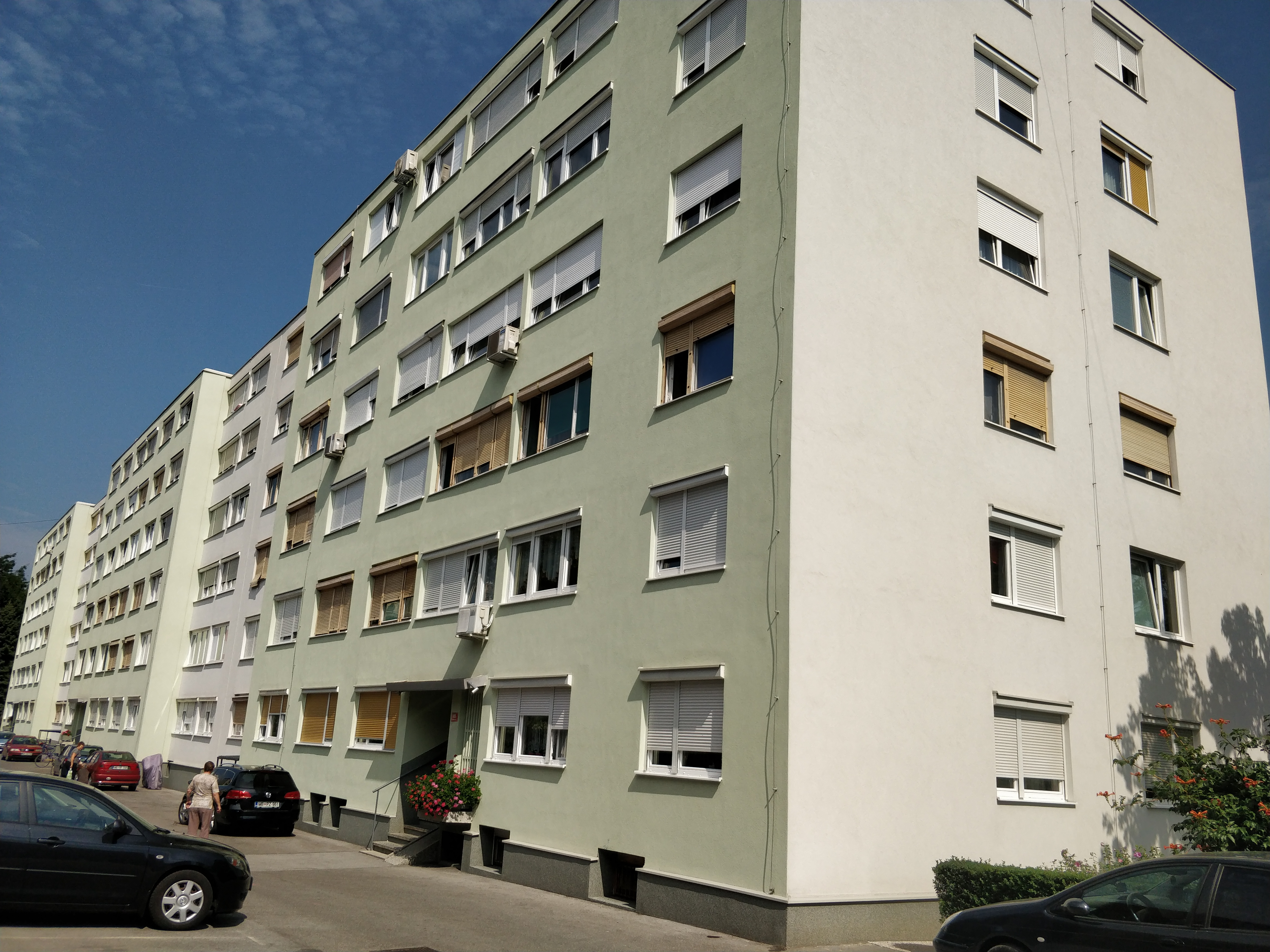 Jugomont, Maribor, Tabor